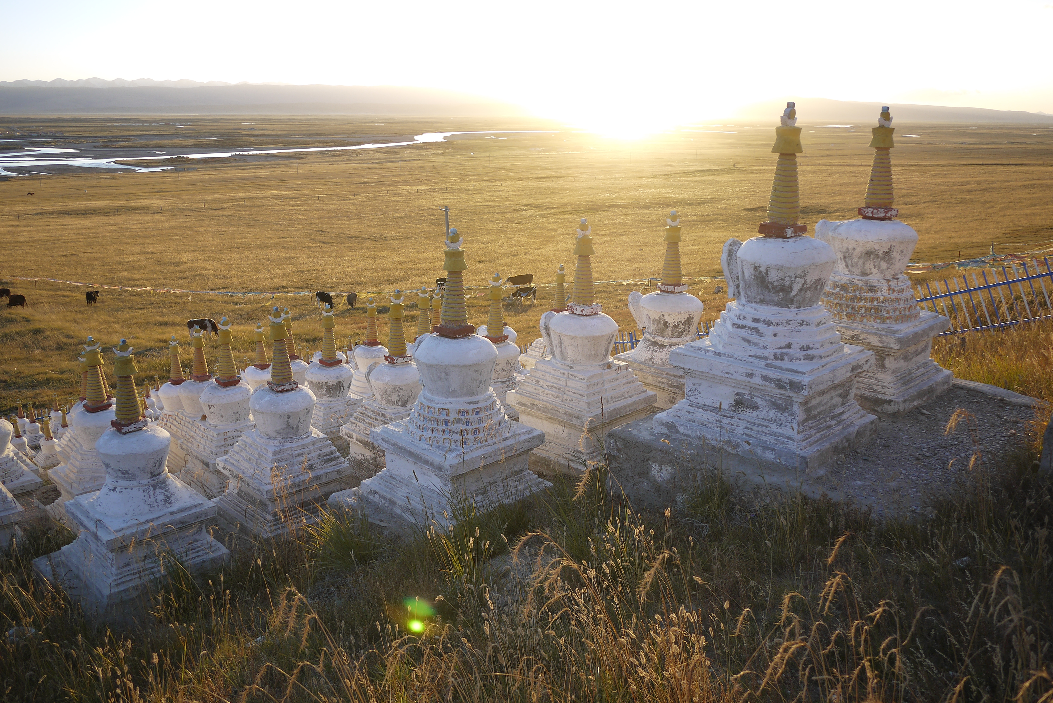 Gangca, Haibei, Qinghai, China